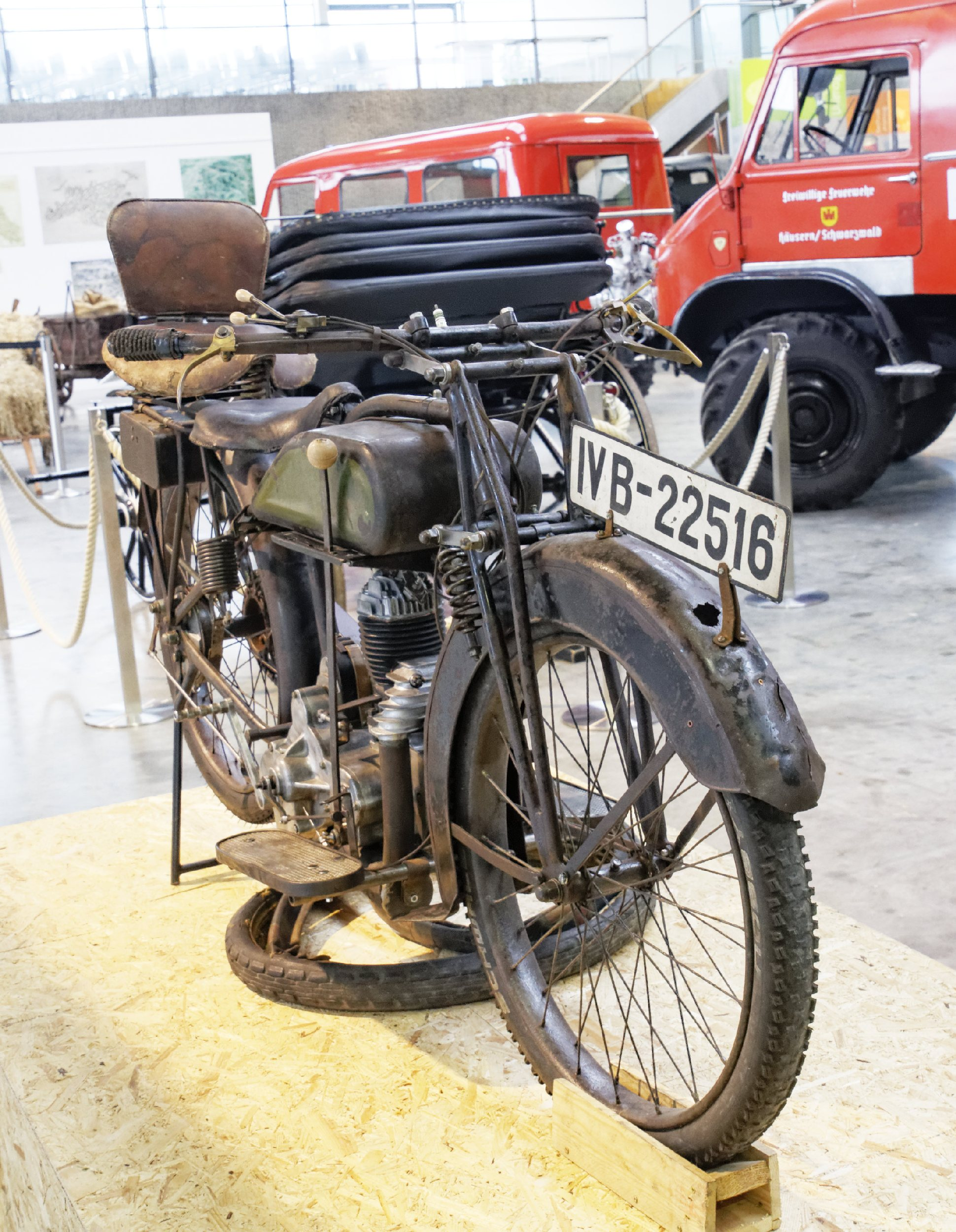 Gaggenau -Unimog-Museum